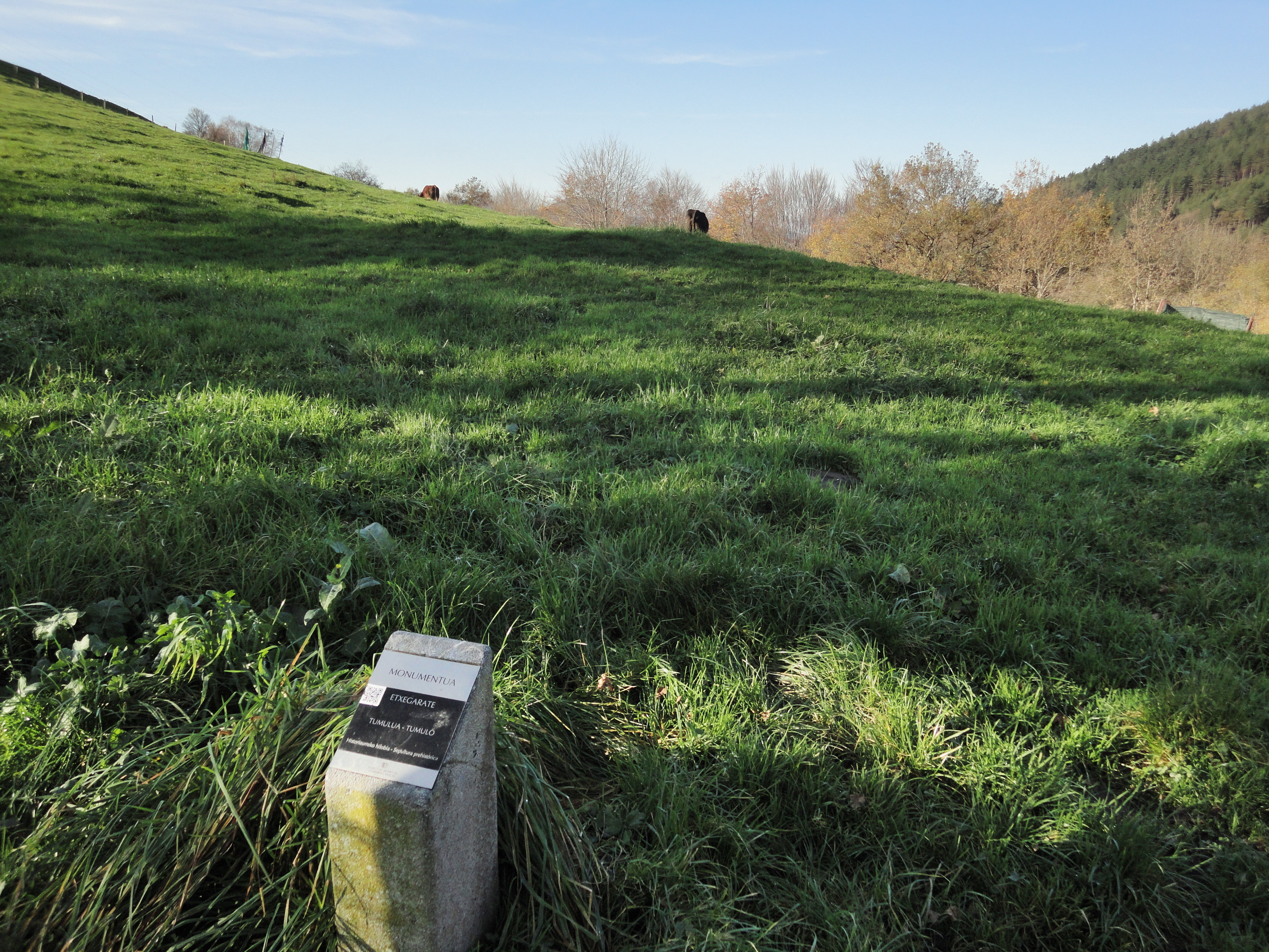 Etxegarate trikuharria